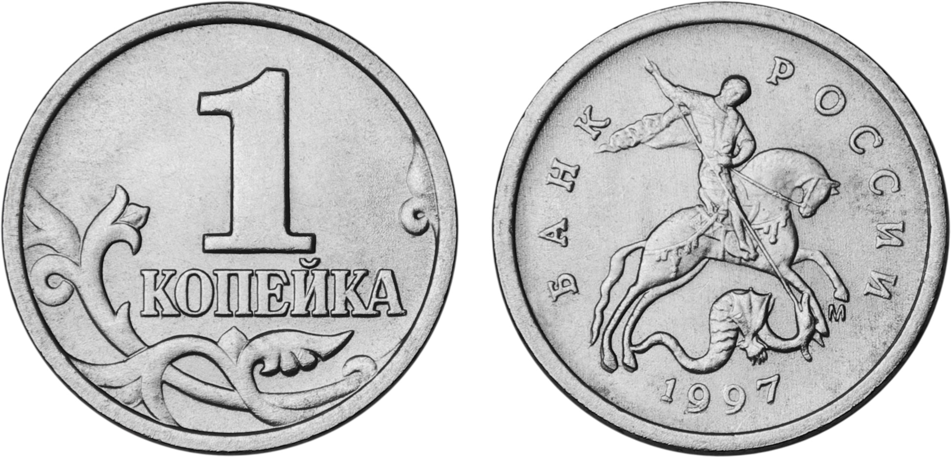 Изображение монеты России номиналом 1 копейка образца 1997 г.